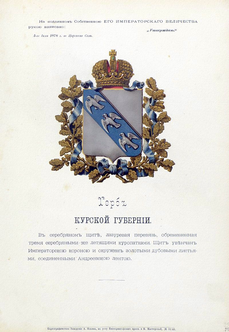 Official Russian Empire coat of arms Kursk Governorate. Гласный герб Российской Империи Курской губернии с официальным описанием в Гербовнике Бенке. Утверждён Императором Всероссийским Александром Вторым в 1878 году.